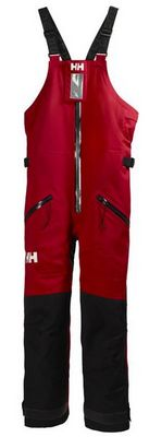 Salopette de quart exemple